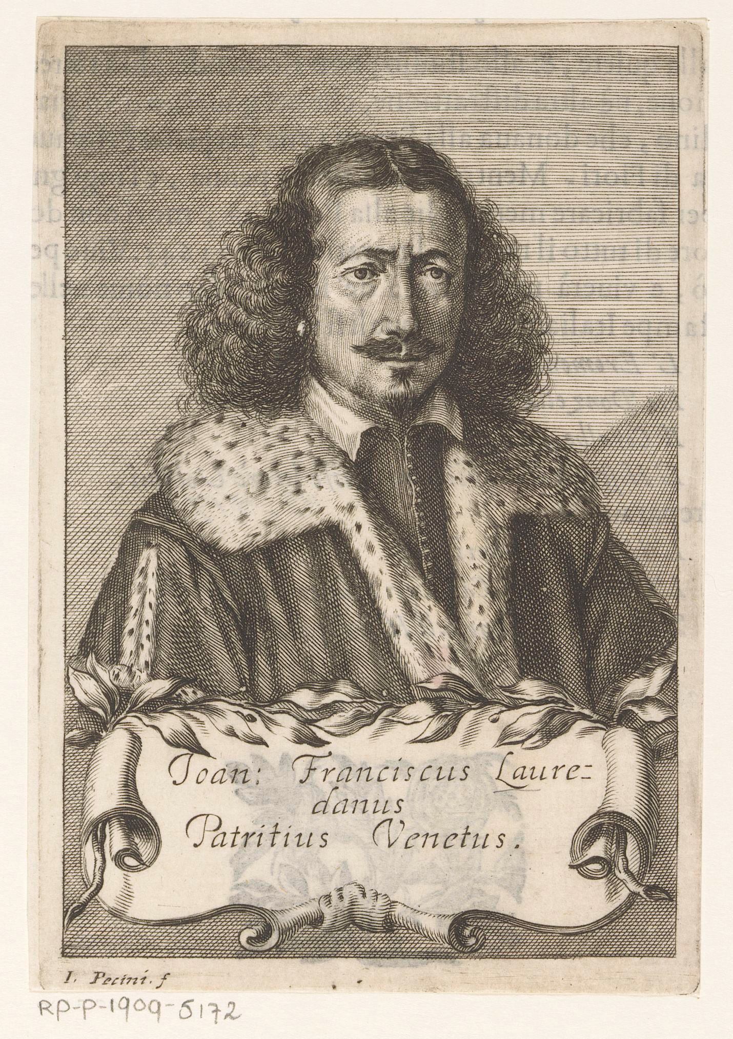 IdentificatieTitel(s): Portret van schrijver Giovan Francesco LoredanObjecttype: prent boekillustratie Objectnummer: RP-P-1909-5172Opschriften / Merken: verzamelaarsmerk, verso, gestempeld: Lugt 2228VervaardigingVervaardiger: prentmaker: Giacomo Piccini (vermeld op object)uitgever: Francesco ValvasensePlaats vervaardiging: VenetiëDatering: 1647Fysieke kenmerken: gravure; verso met tekst in boekdrukMateriaal: papier Techniek: graveren (drukprocedé) / boekdrukAfmetingen: plaatrand: h 152 mm × b 105 mmToelichtingPrent uit de publicatie: Loredan, Giovan Francesco. Le glorie degli Incogniti. Venetië: Francesco Valvasense, 1647, p. 244.OnderwerpWat: historical personsportrait of a writerWie: Giovan Francesco LoredanVerwerving en rechtenVerwerving: aankoop 1905Copyright: Publiek domein